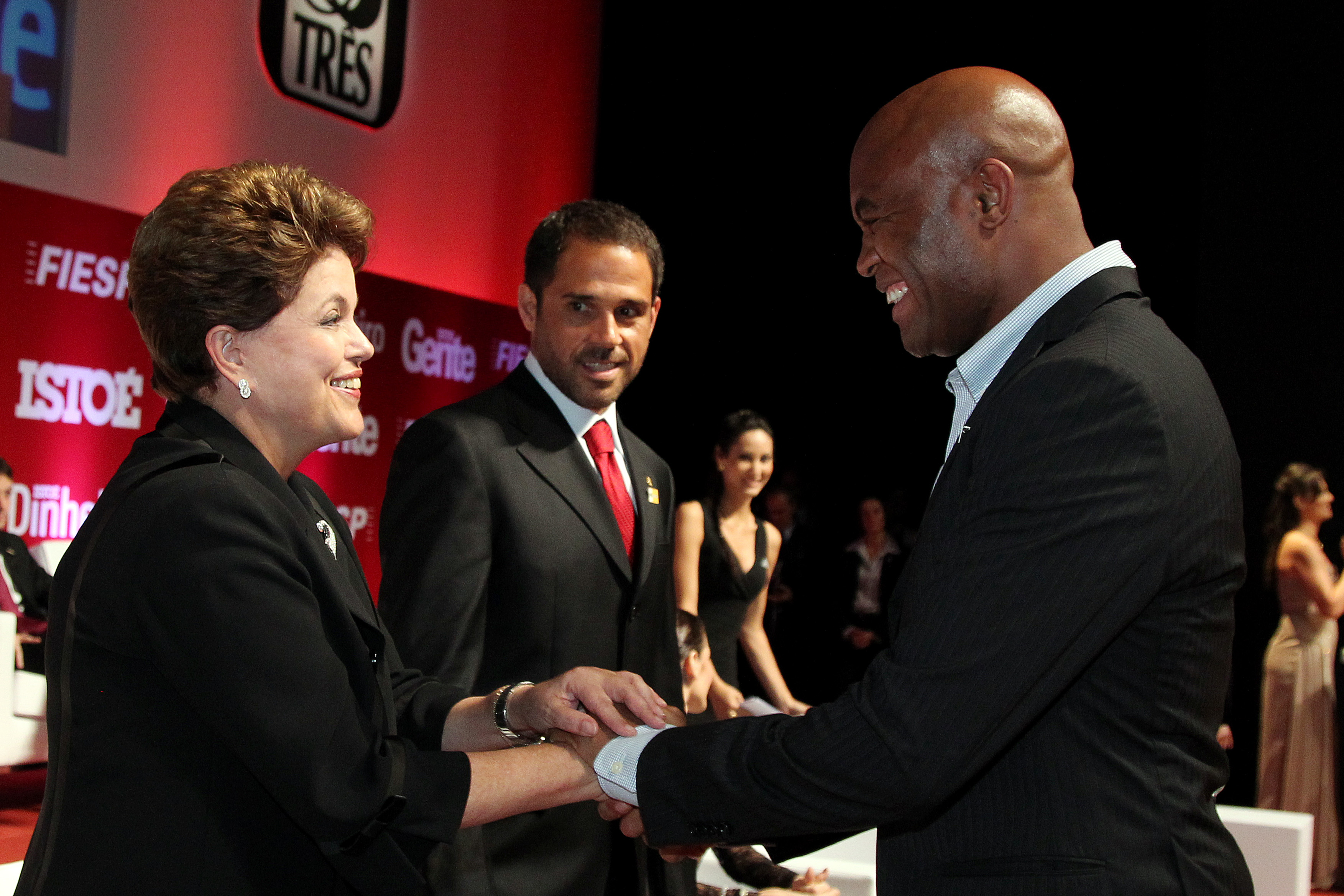 Presidenta Dilma Rousseff e o atleta Anderson Silva, durante cerimônia de entrega do Prêmio " Os Brasileiros do Ano", promovido pelas revistas Istoé, istoé Dinheiro e Istoé Gente. (São Paulo-SP, 06/12/2011)